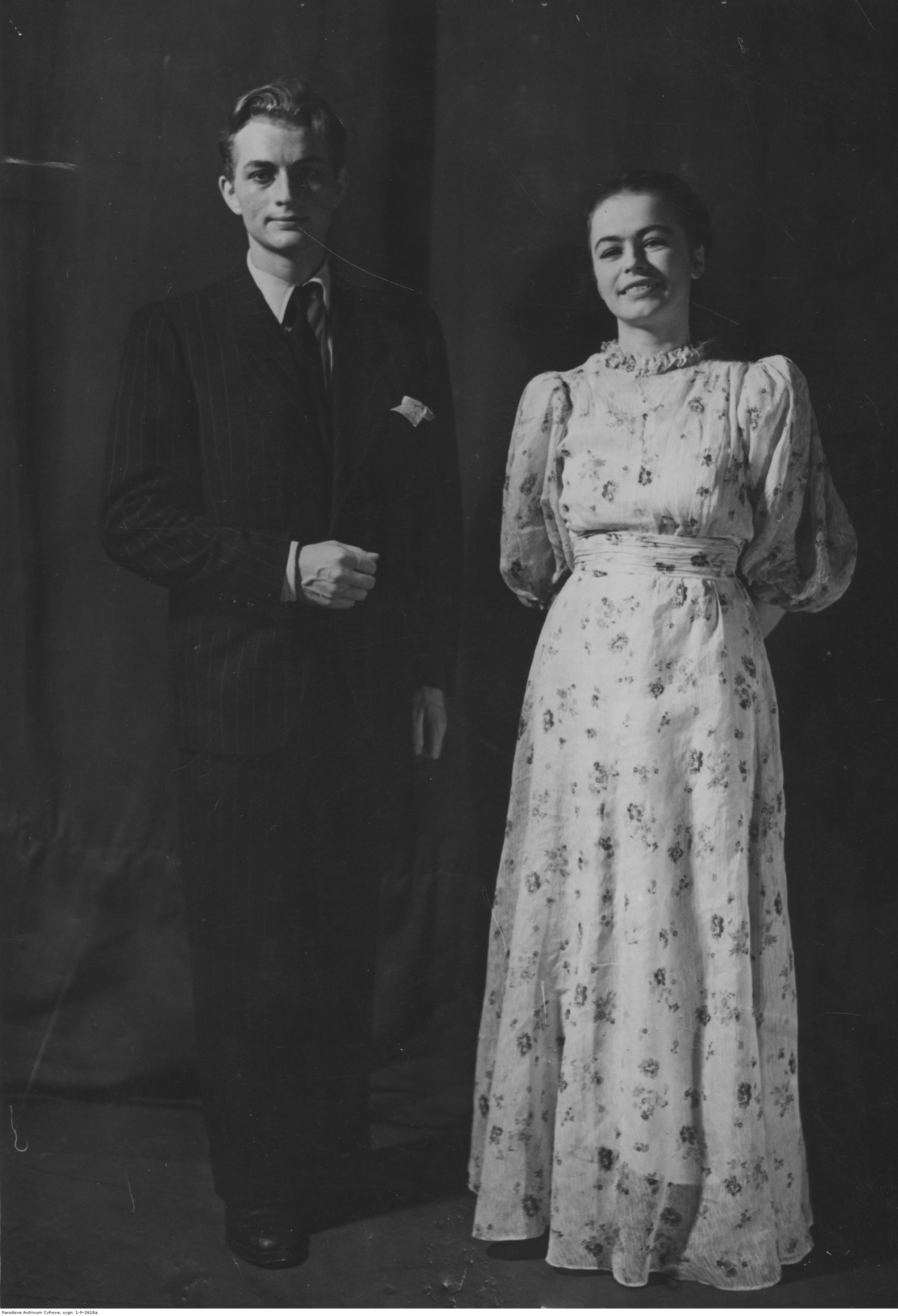 Absolwenci Państwowego Instytutu Sztuki Teatralnej: Czesław Kulak i Danuta Szaflarska.